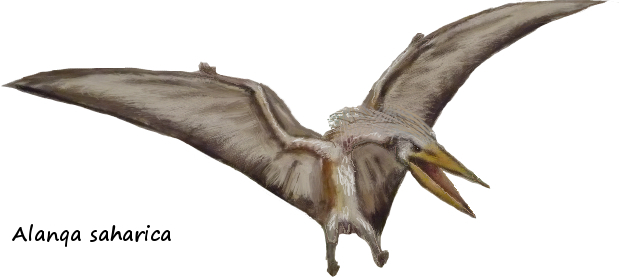 Птерозавр Alanqa saharica